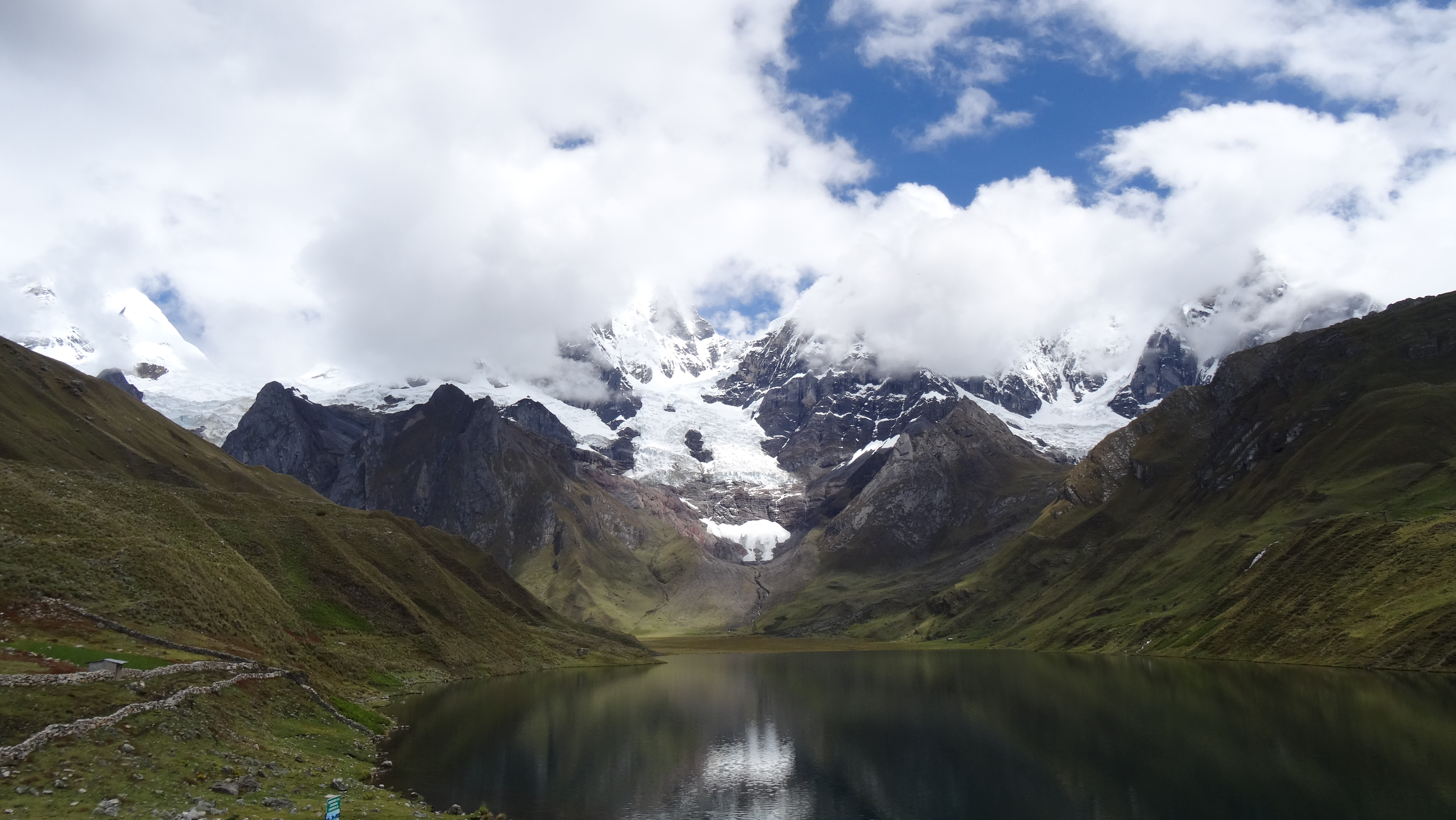 Pared noreste de la cordillera vista desde la orilla de la laguna Carhuacocha.